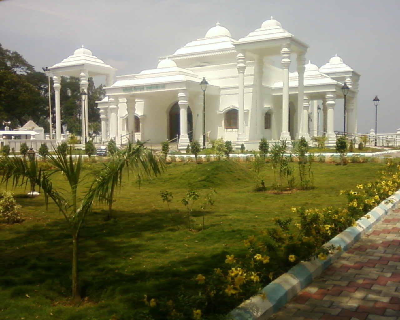 கரிகால சோழன் நினைவு மணிமண்டபம்